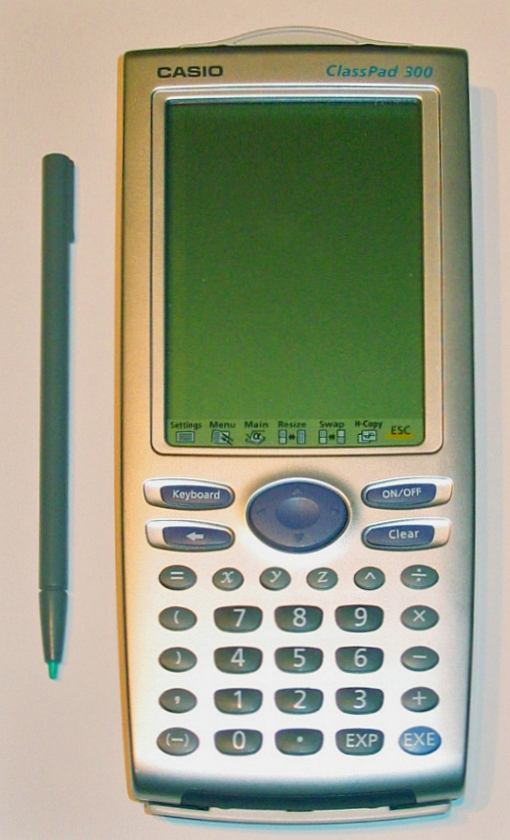 Casio ClassPad 300 Calculator